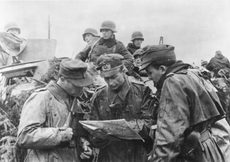 Scherl Bilderdienst: Im Kampfraum Luxemburg Lagebesprechnung bei einer Kampfgruppe, die zum Angriff gegen Höhenstellungen, die von den US-Amerikanern besetzt sind, angetreten ist. PK-Aufnahme: Kriegsberichter Göttert 4.1.45 [Herausgabedatum]